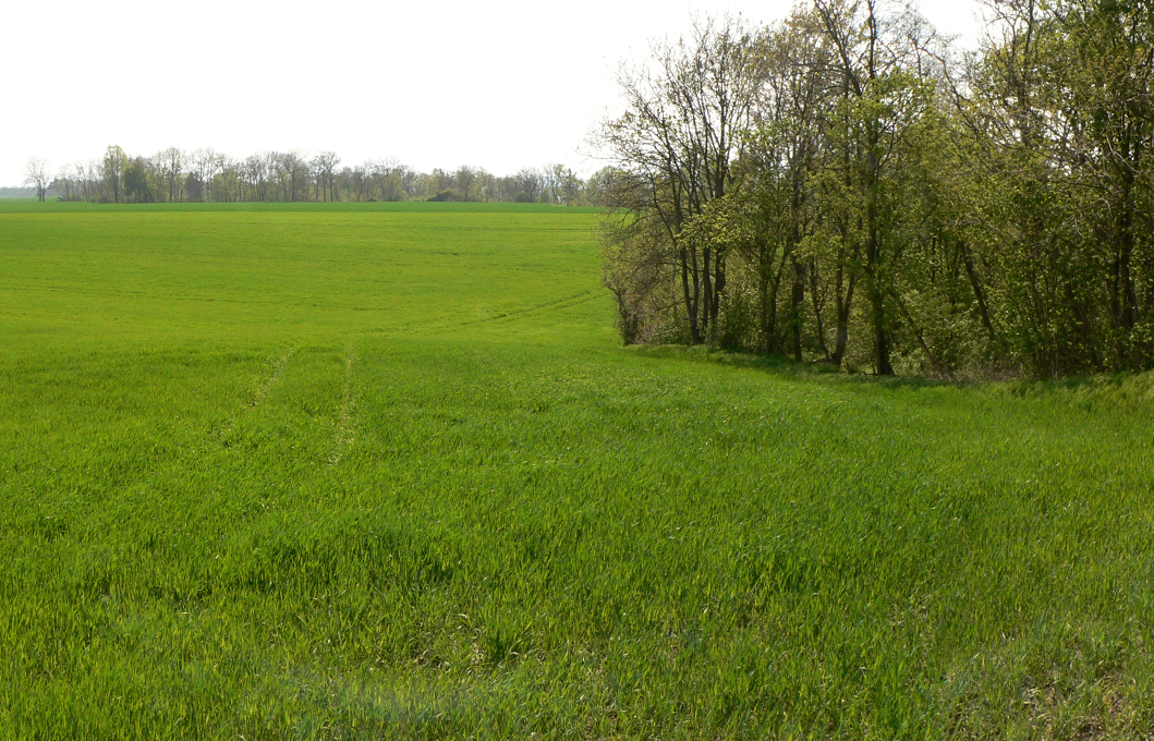 Hangeinschnitt an der Schwedenschanze Isingerode